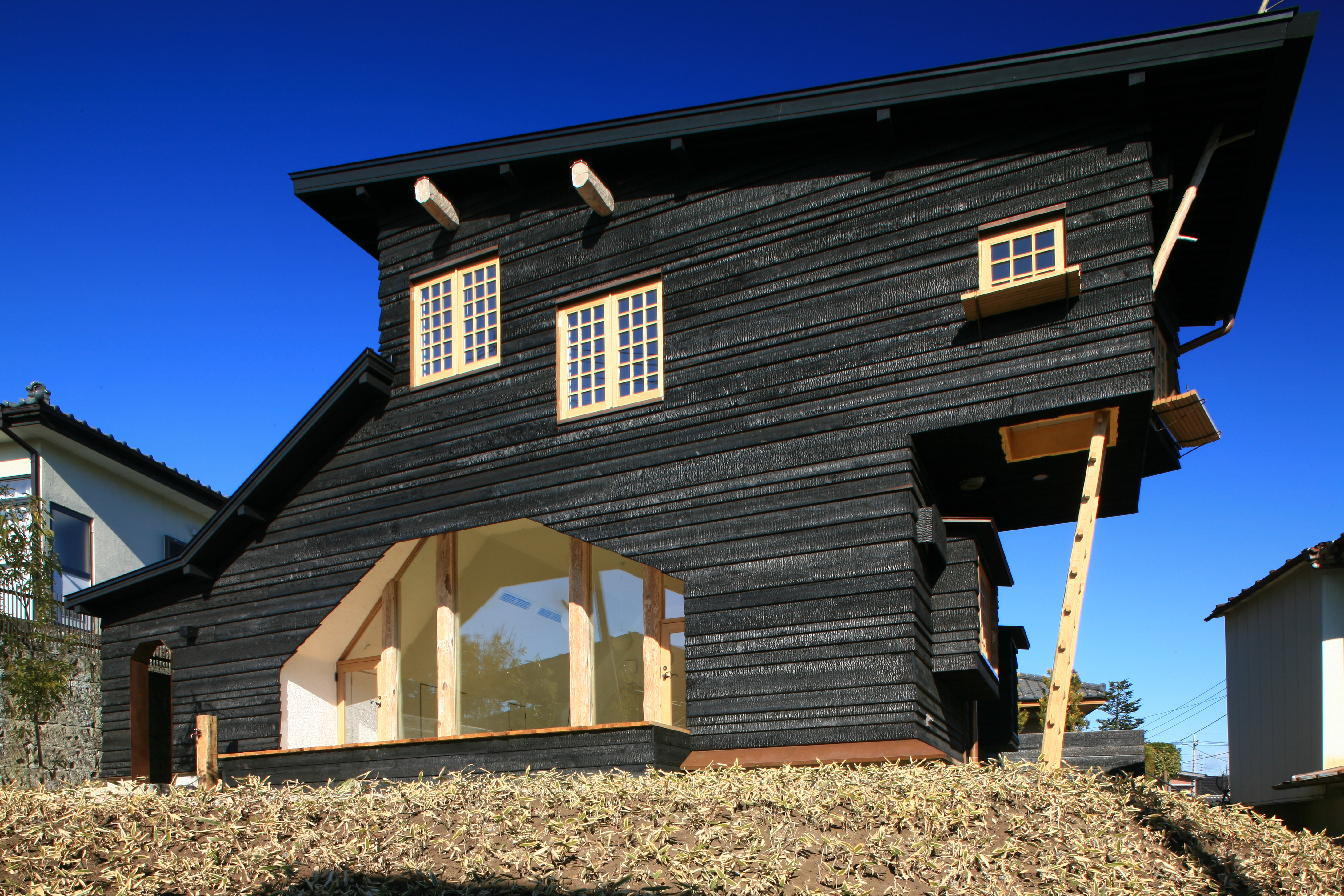 藤森照信設計のコールハウス。